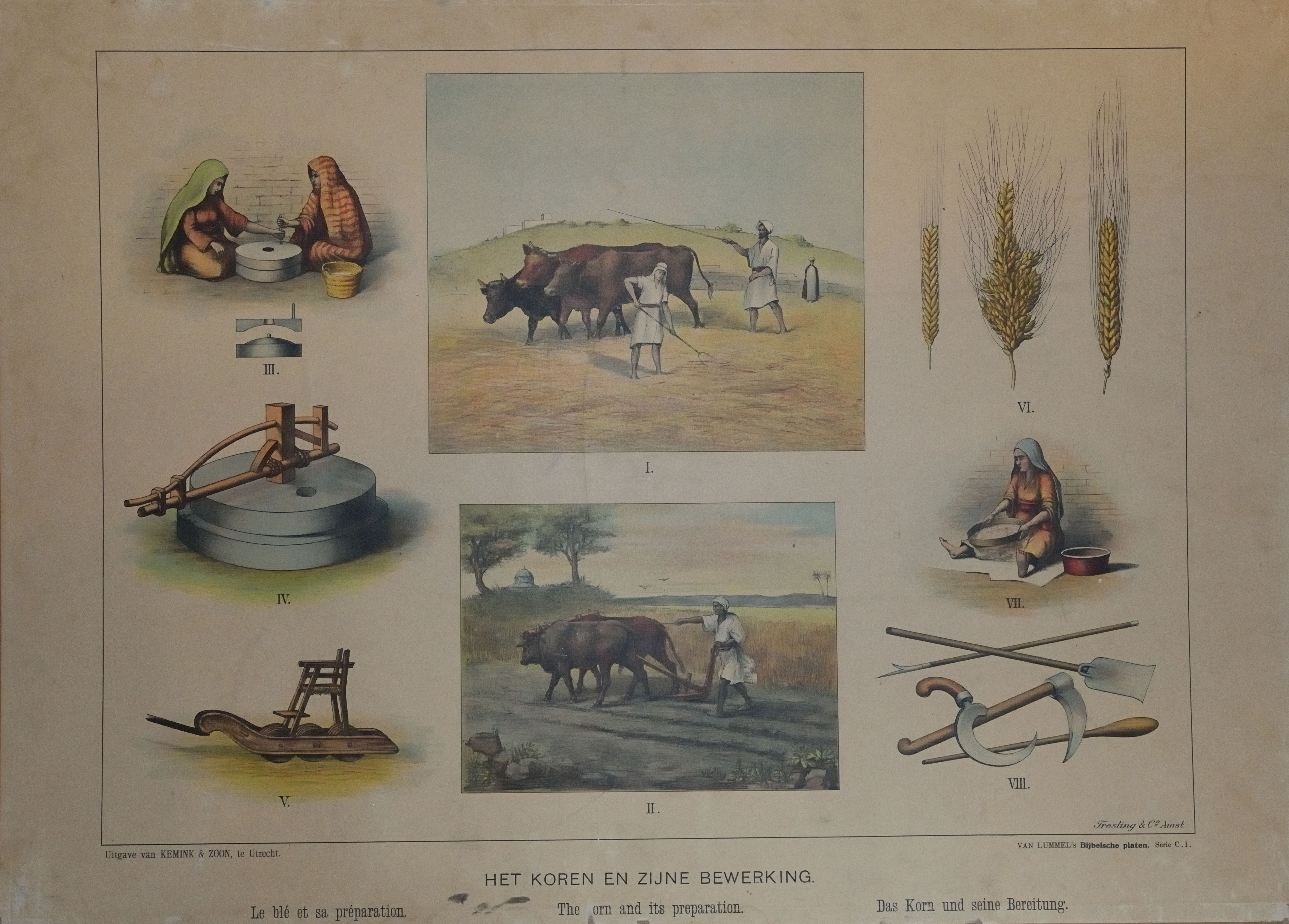 Hendrik Jan van Lummel, bijbelse platen: het koren en zijn bewerking